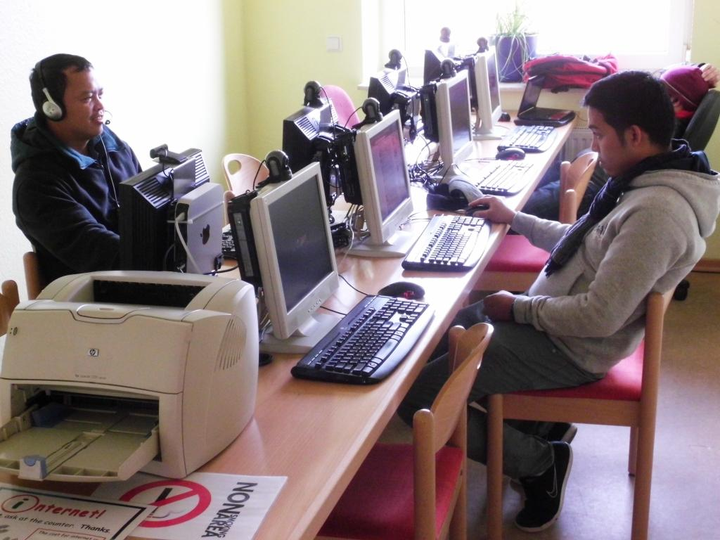 Seamannsclub Welcome, Internetcafe